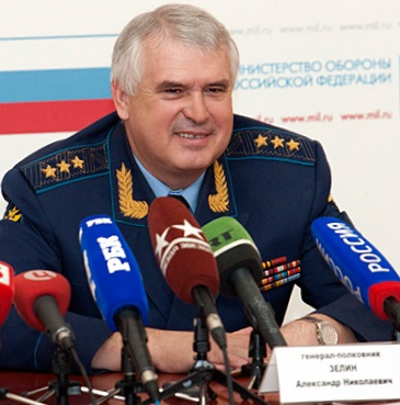 Александр Николаевич Зелин (род.1953) — российский военачальник